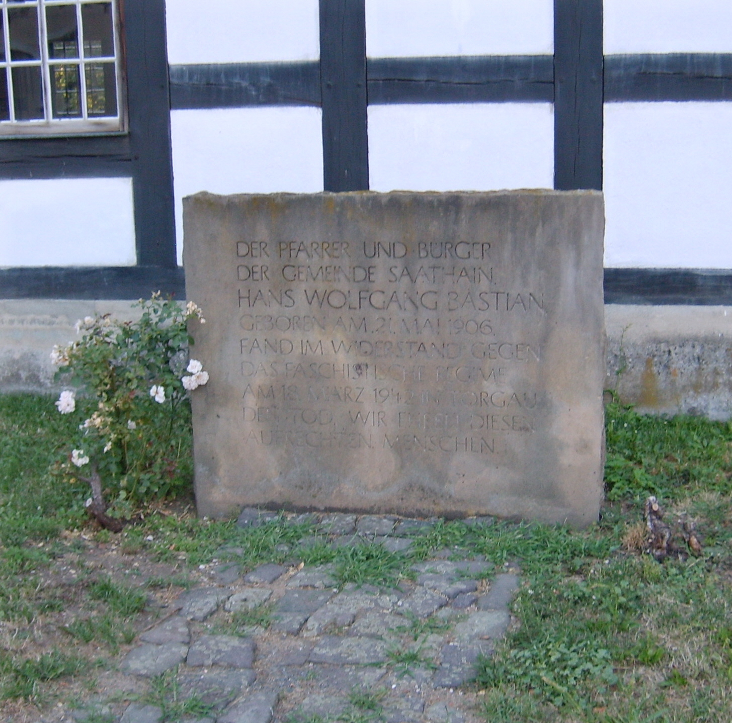 Der Gedenkstein zu Ehren Wolfgang Bastians in Saathain.